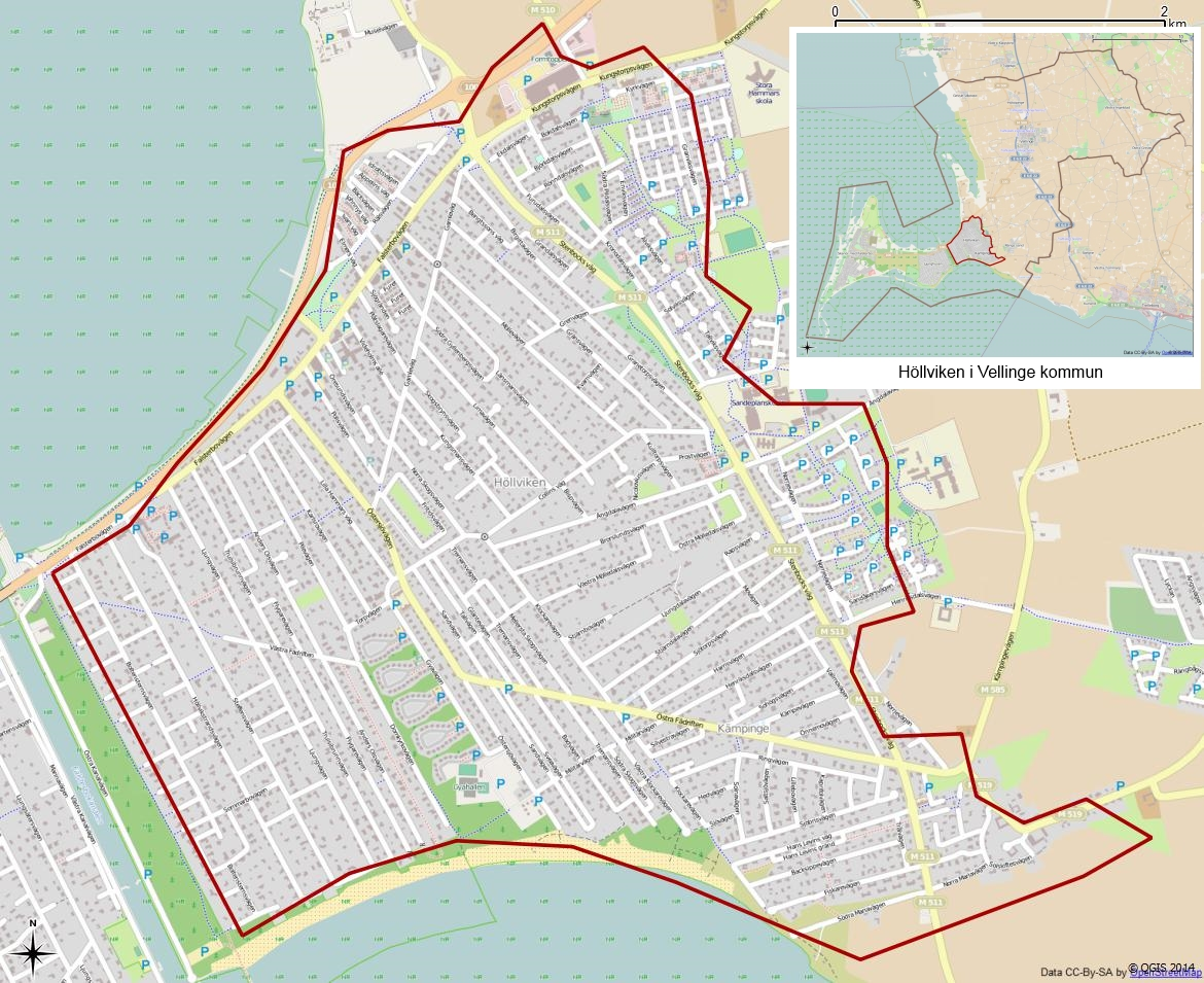 Tätorten Höllvikens gränser 1990 enligt Atlas över rikets indelningar 1992.